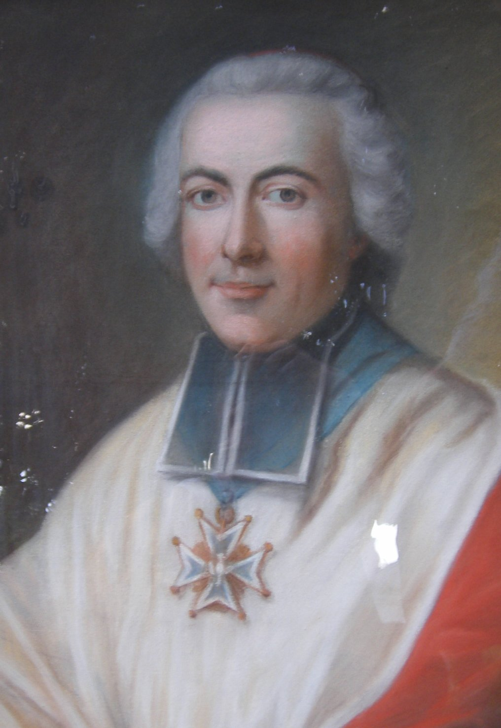 Cardinal de Rochechouart